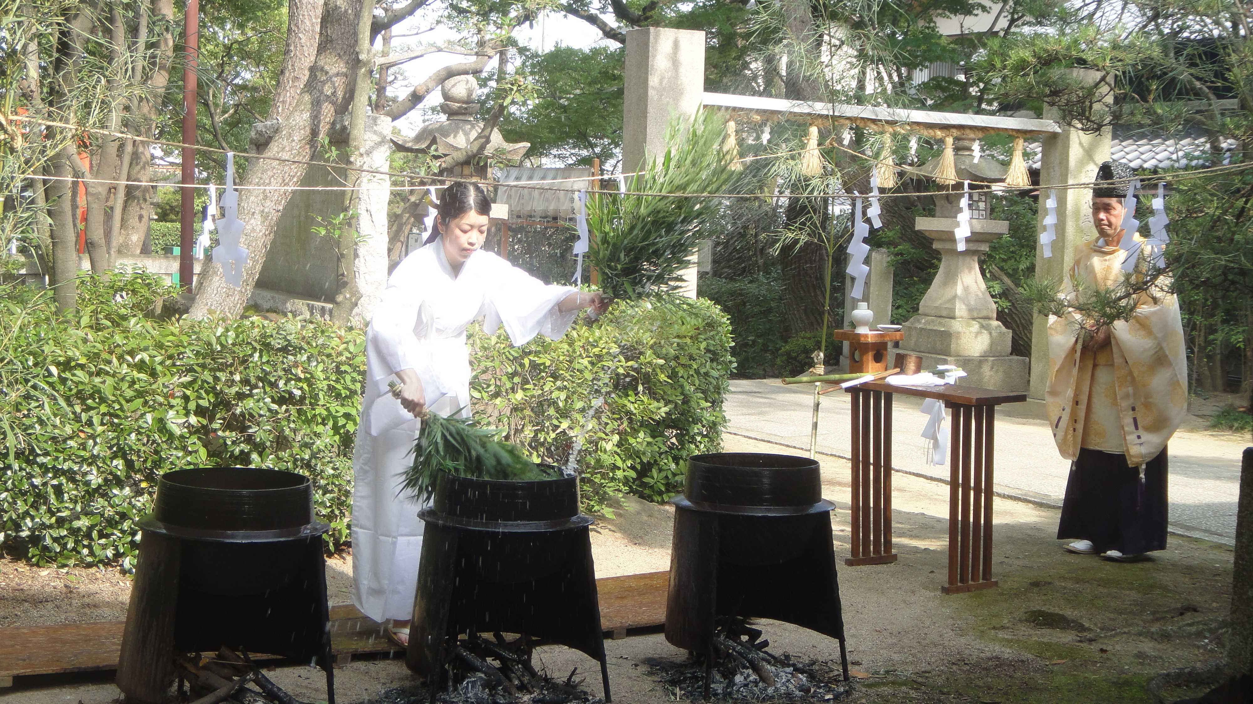 兵庫県伊丹市にある須佐男神社での湯立神楽